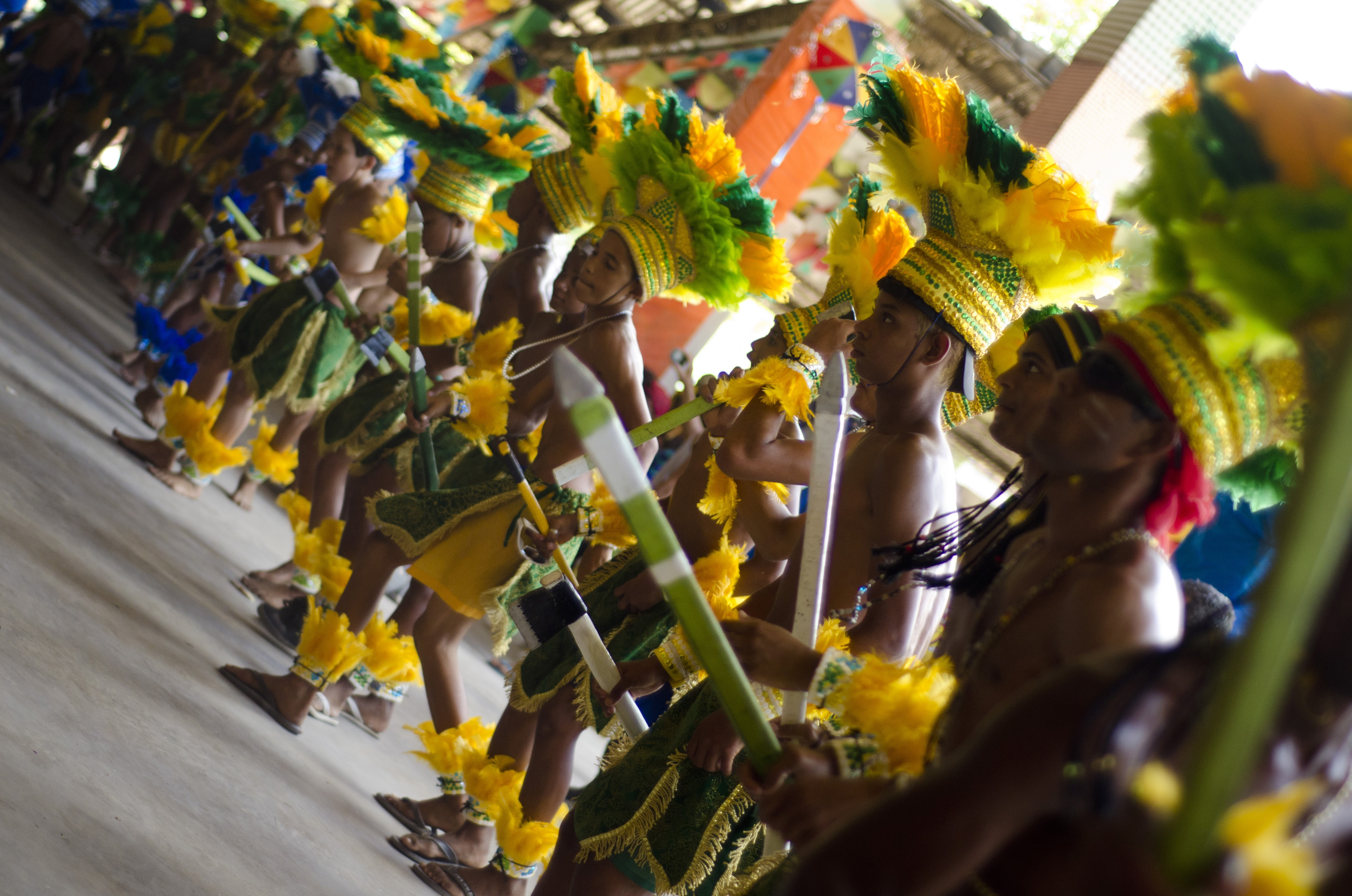 Caboclinhos - Olinda, Pernambuco, Brasil